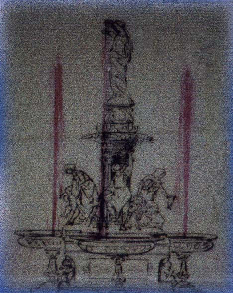 Skizze August von Krelings zur späteren Tyler Davidson Fountain, um 1840